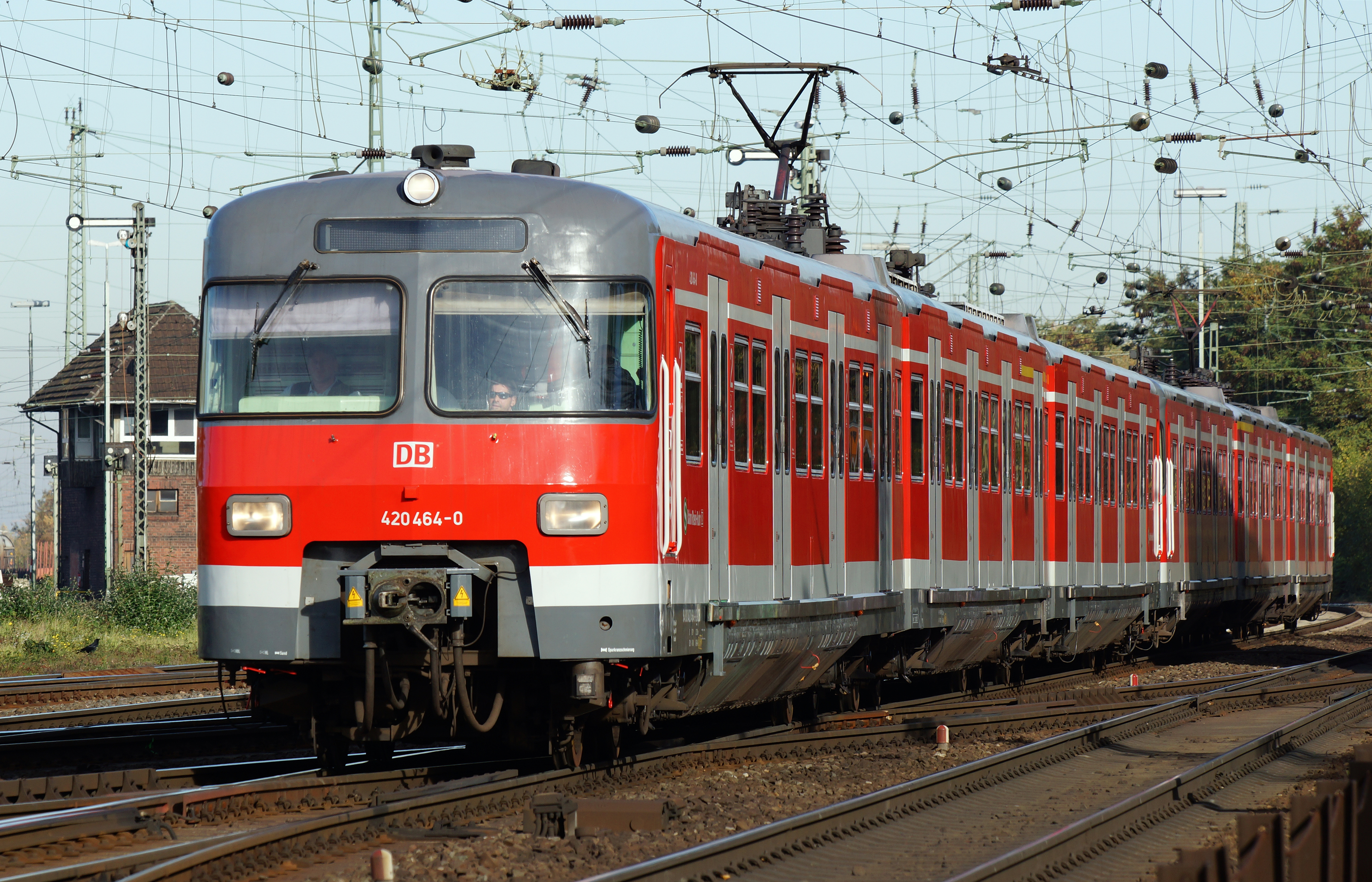 DBAG 420 464-0 in der Nähe des Rangierbahnhofs Köln-Kalk Nord.